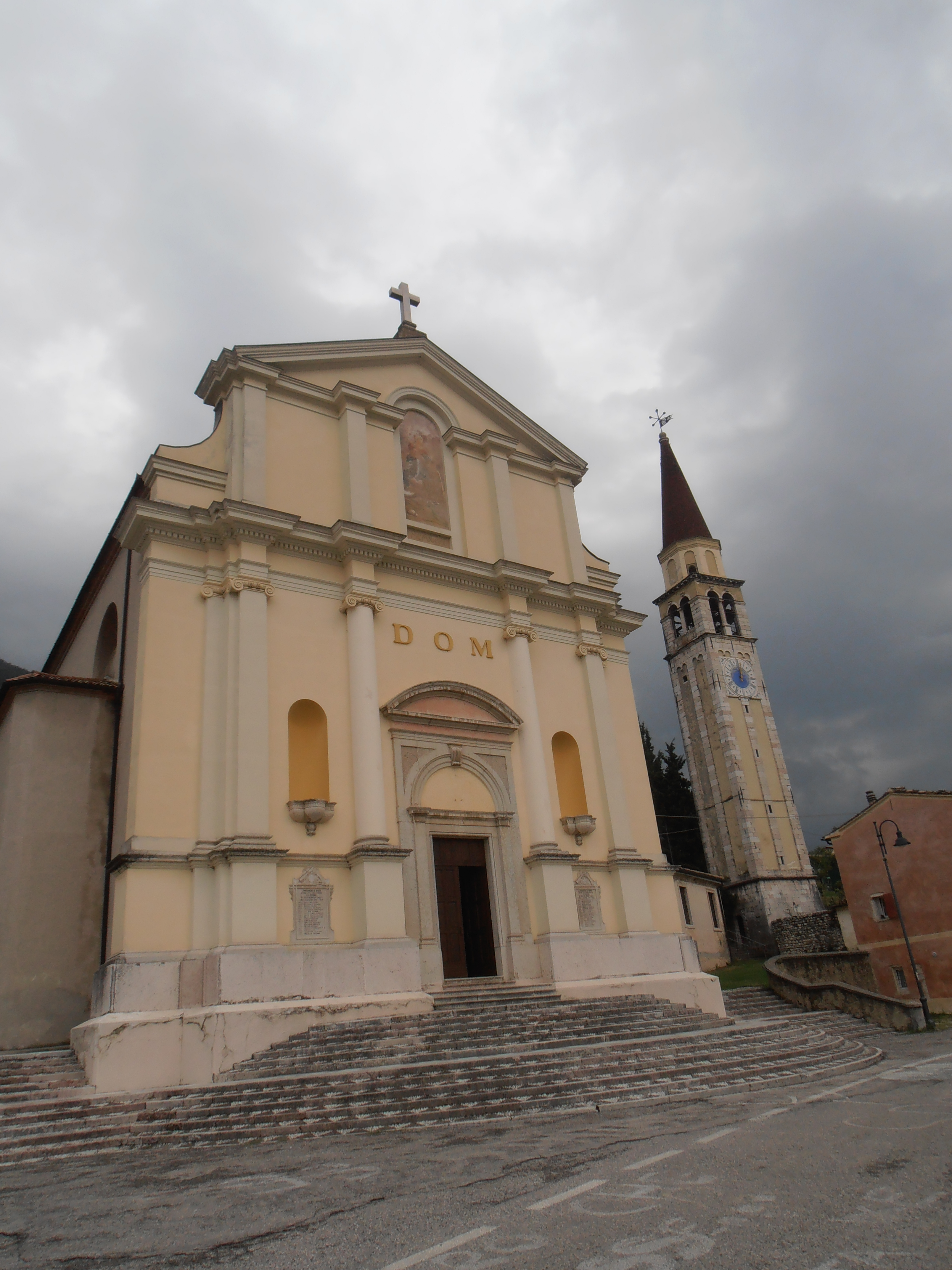 Borso del Grappa (Italie), Eglise